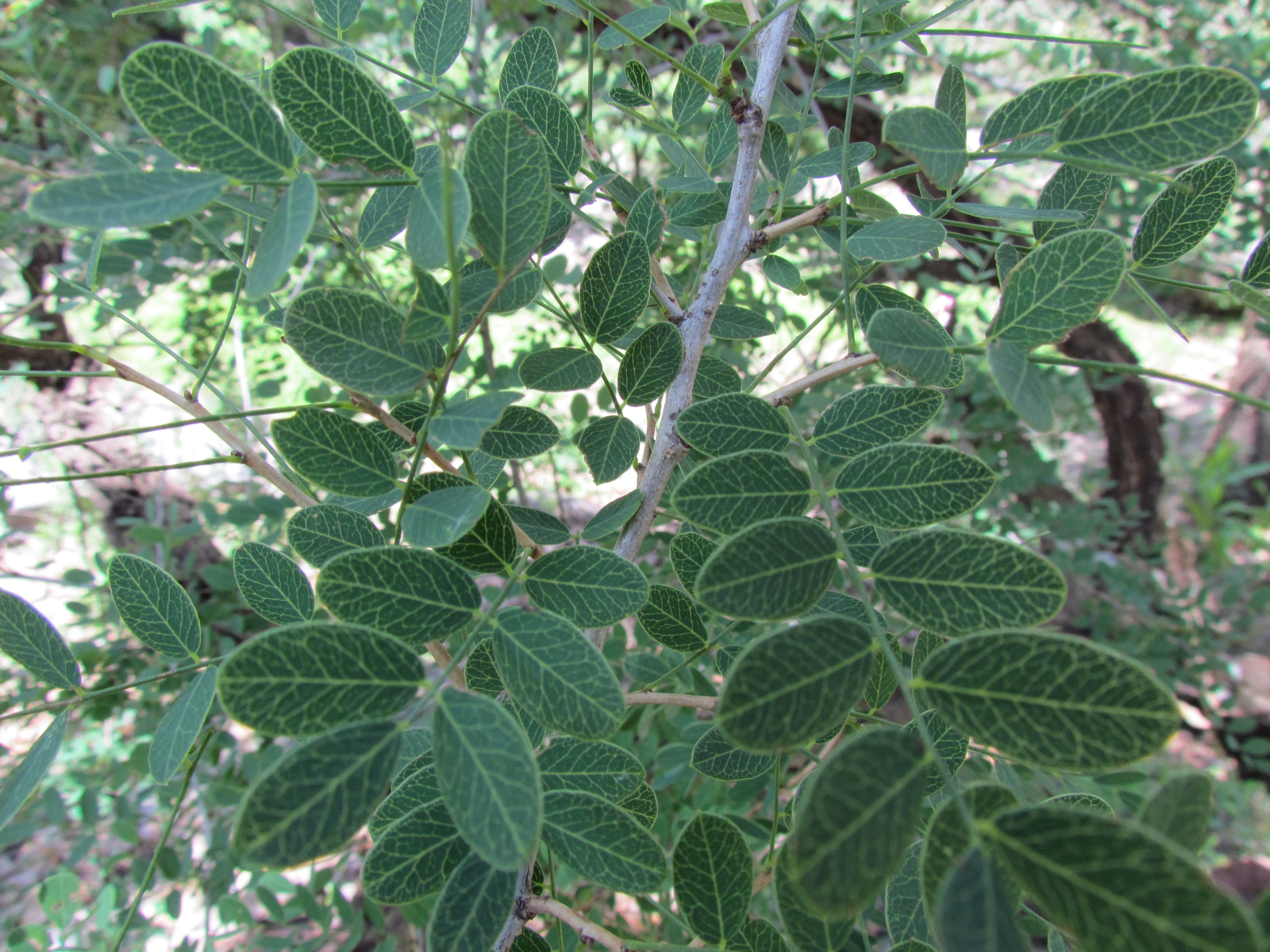 Hojas